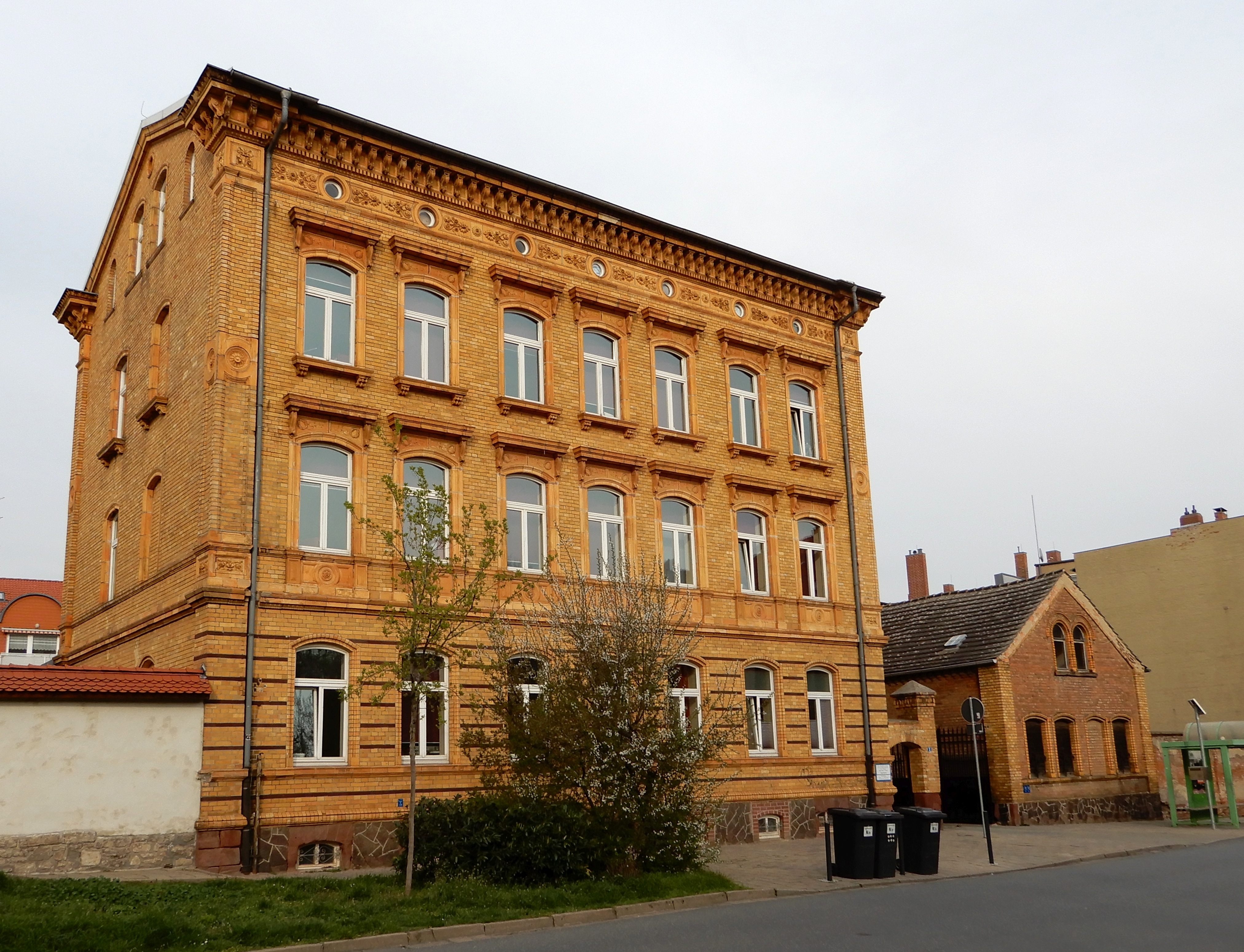 Haus Johannispromenade 3